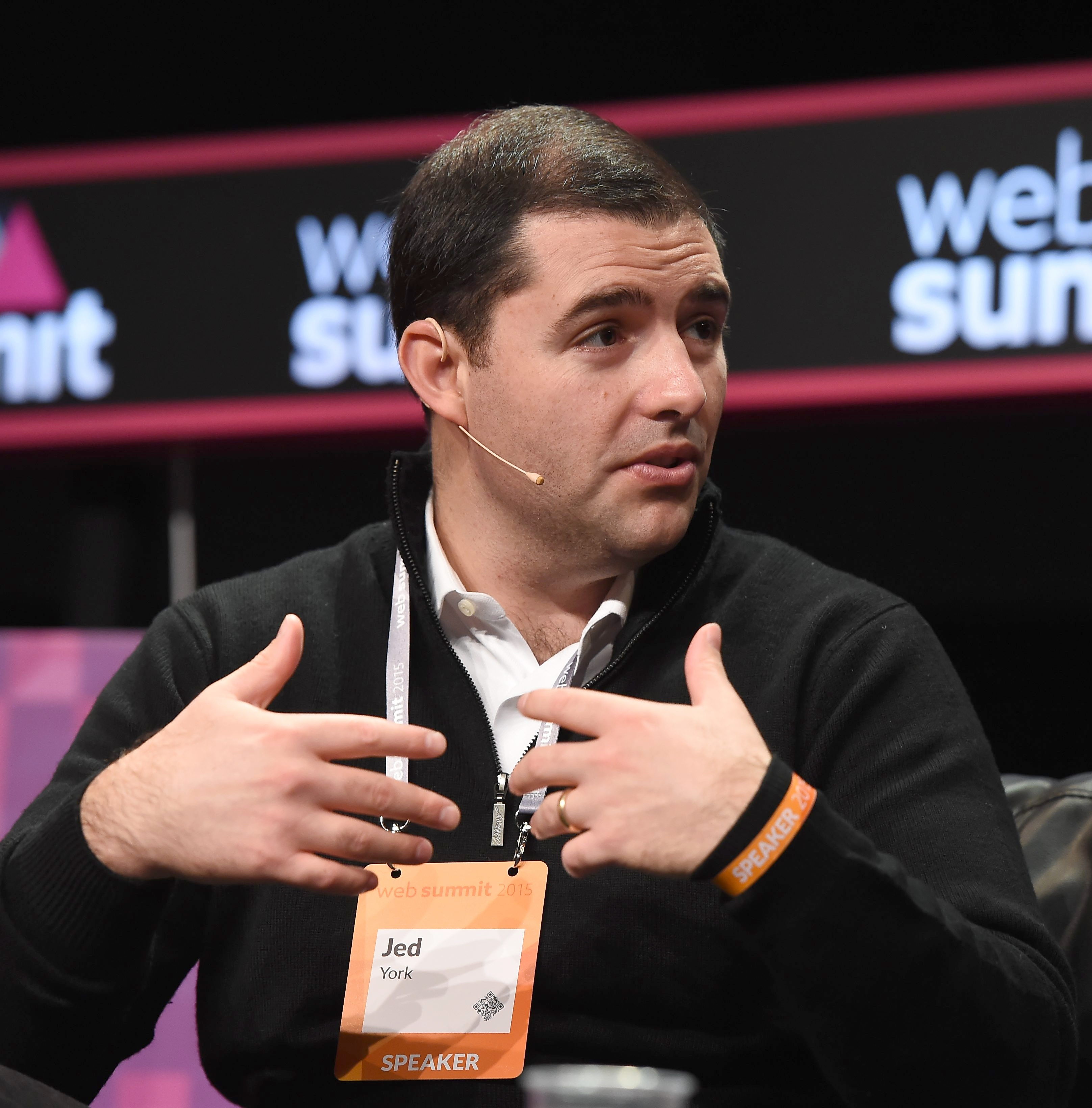 Sportsfile (Web Summit)